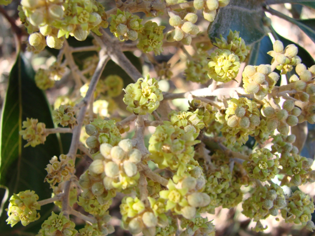 Schefflera macrocarpa - ARALIACEAE - Jardim Botânico de Brasília - DF - Brasil